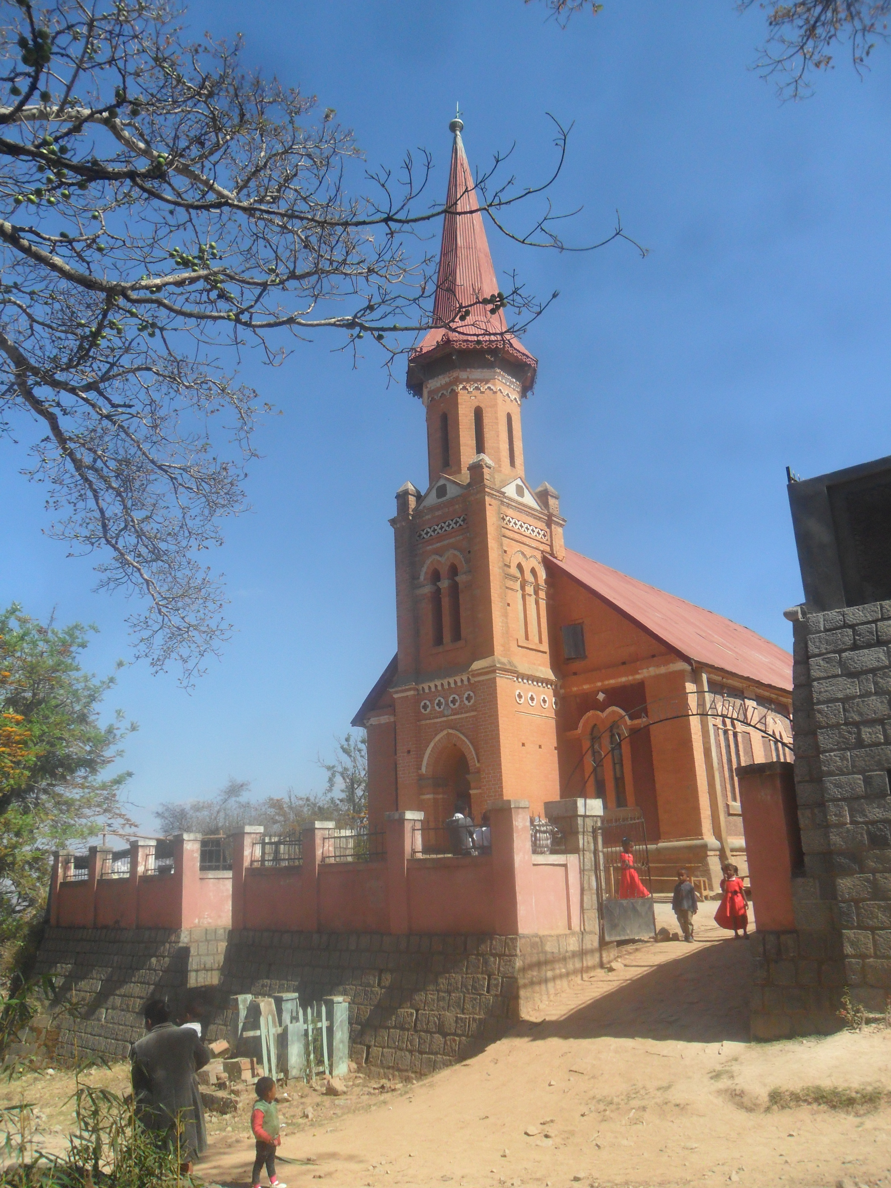 Temple protestant construit en 1868 sur la colline royale d'Antsahadinta, Antananarivo, Madagascar